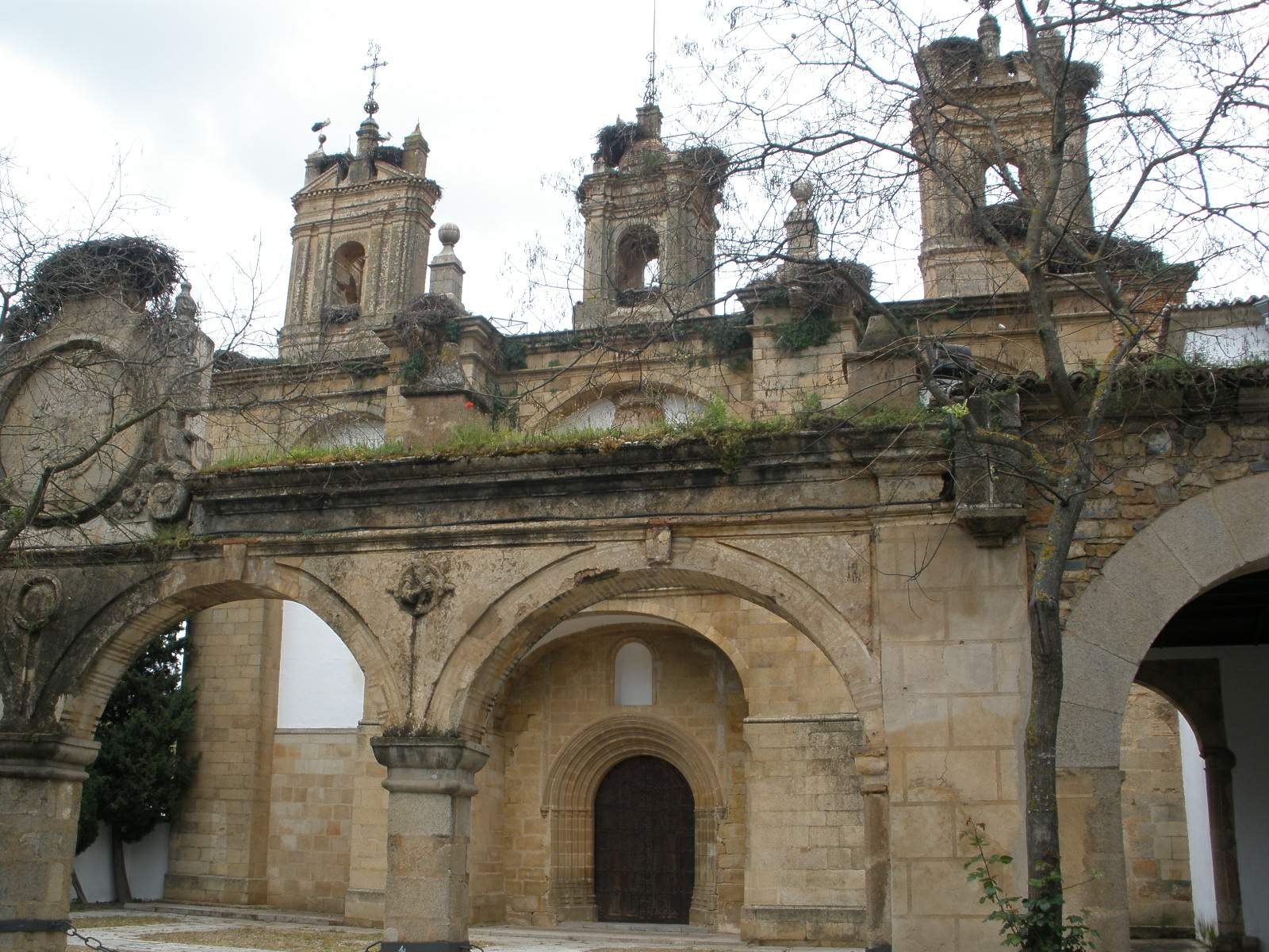 Cáceres - Monasterio de San Francisco el Real